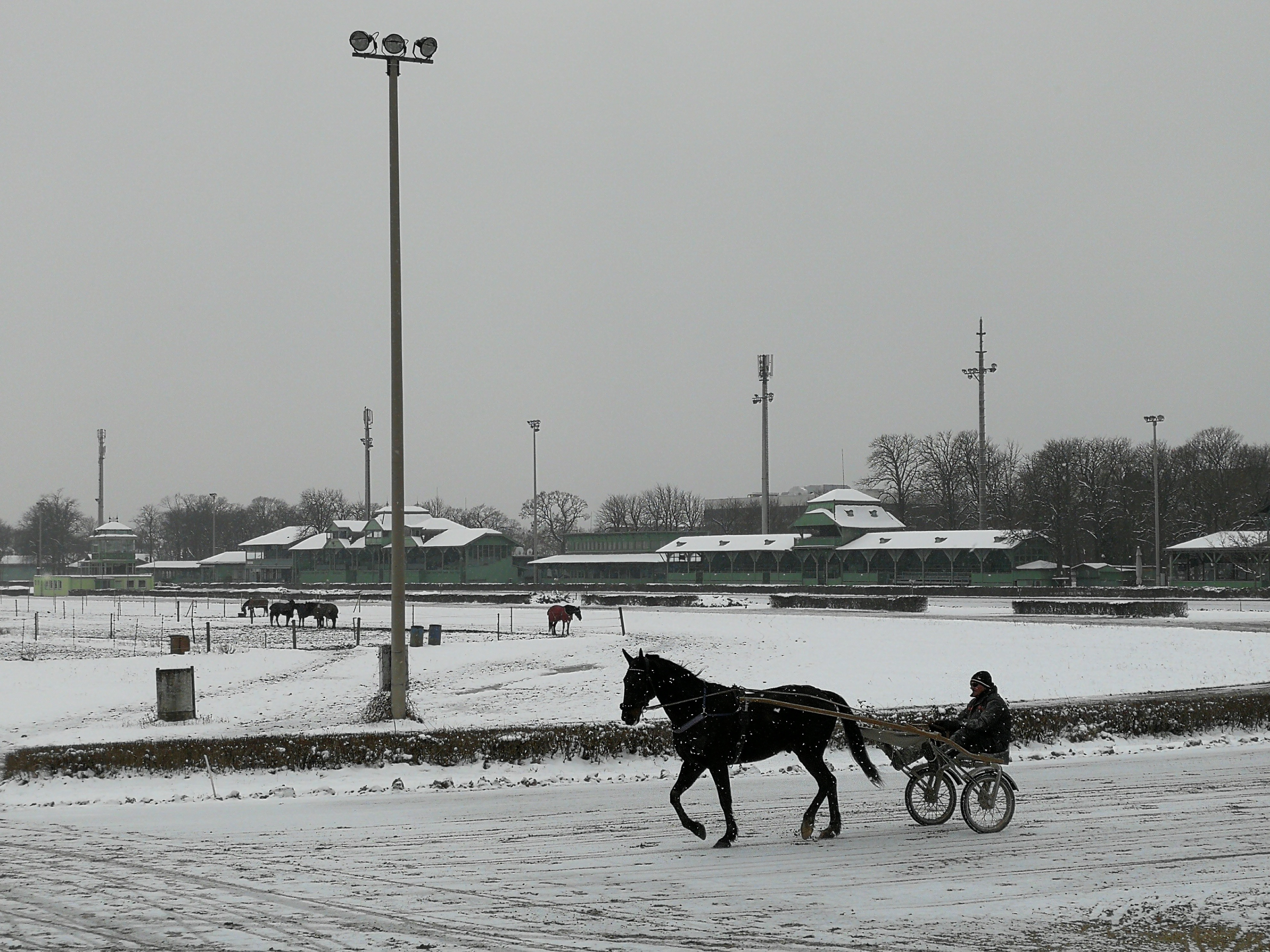 Trabrennbahn Baden bei Wien im Winter